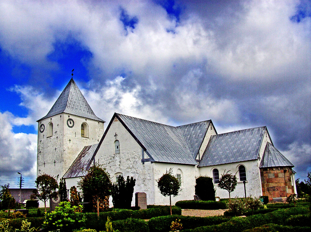 fra sydøst